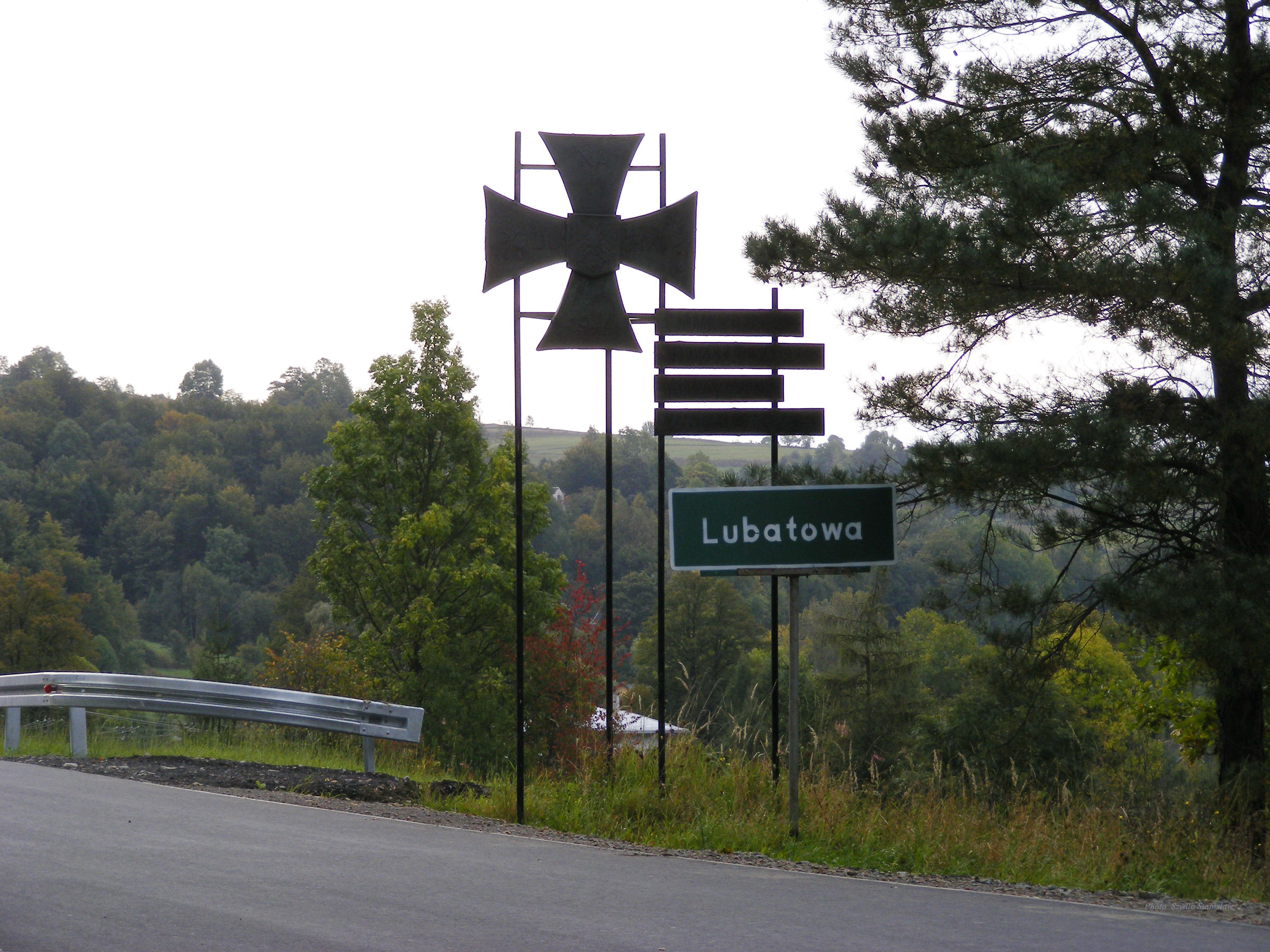 Wieś odznaczona Krzyżem Walecznych